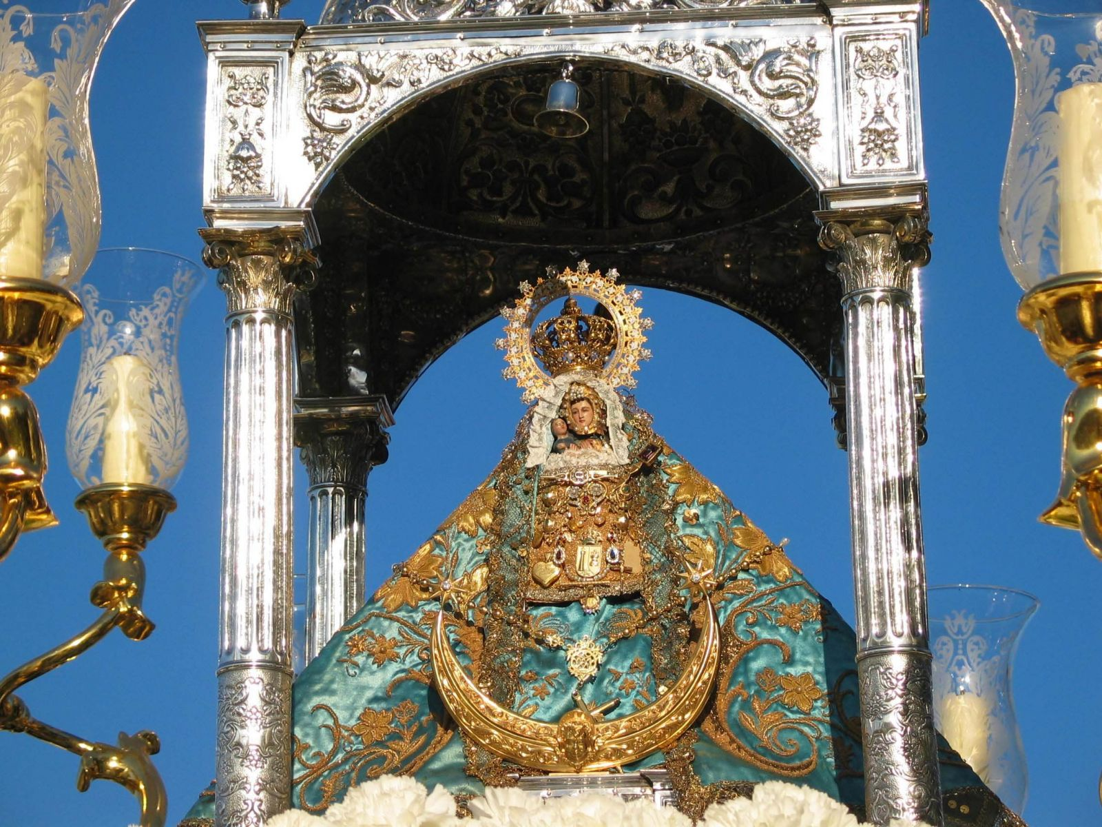 Nuestra Señora de los Remedios